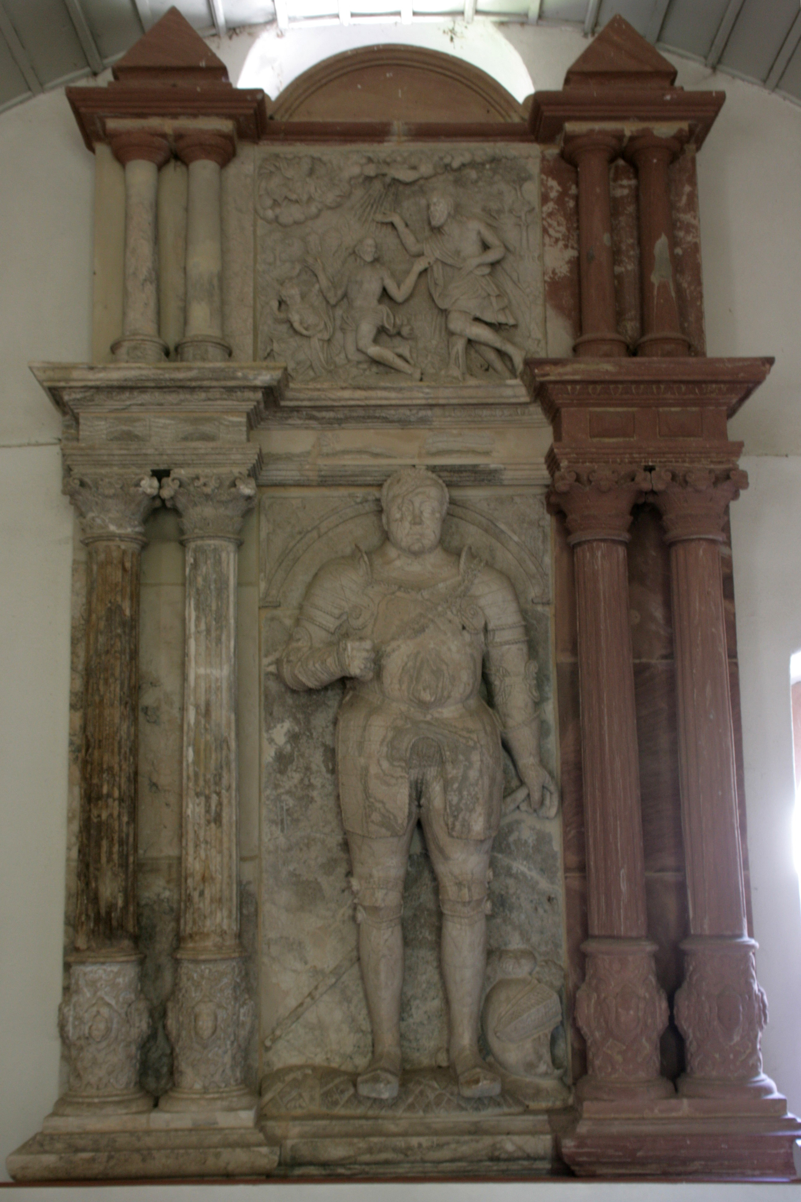 Kapelle von Burg Frankenstein in Mühltal (Hessen)